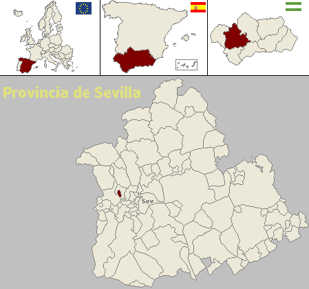 Mapa de localización del municipio sevillano de Albaida del Aljarafe (Andalucía, España)